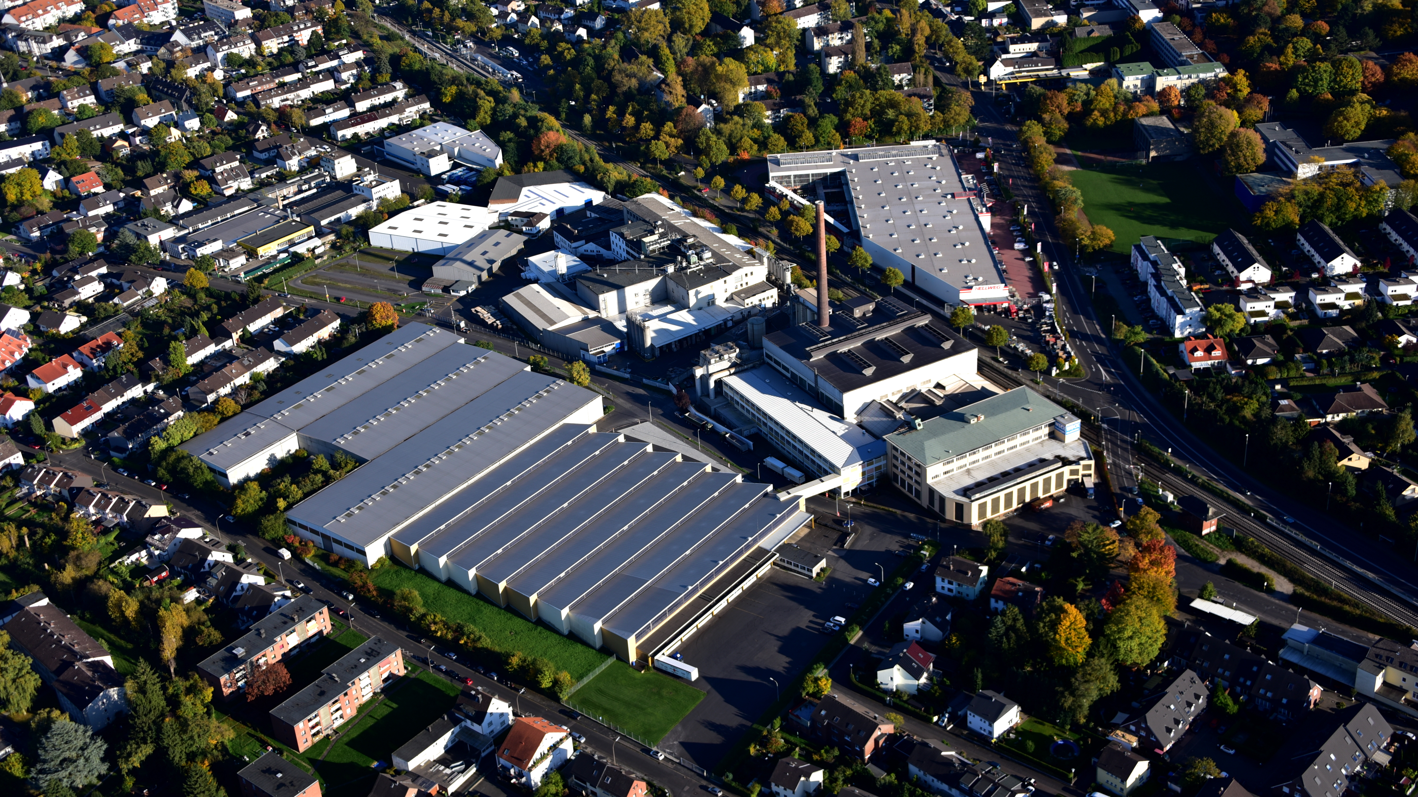 J. Weck GmbH u. Co. KG, Werk Bonn-Duisdorf, Luftaufnahme (2017)